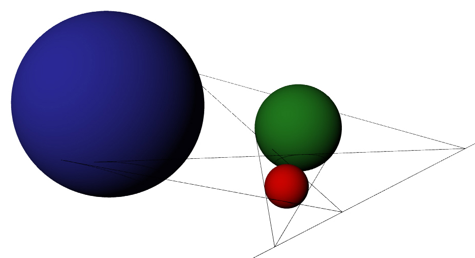 Ilustração do teorema de Monge em 3D